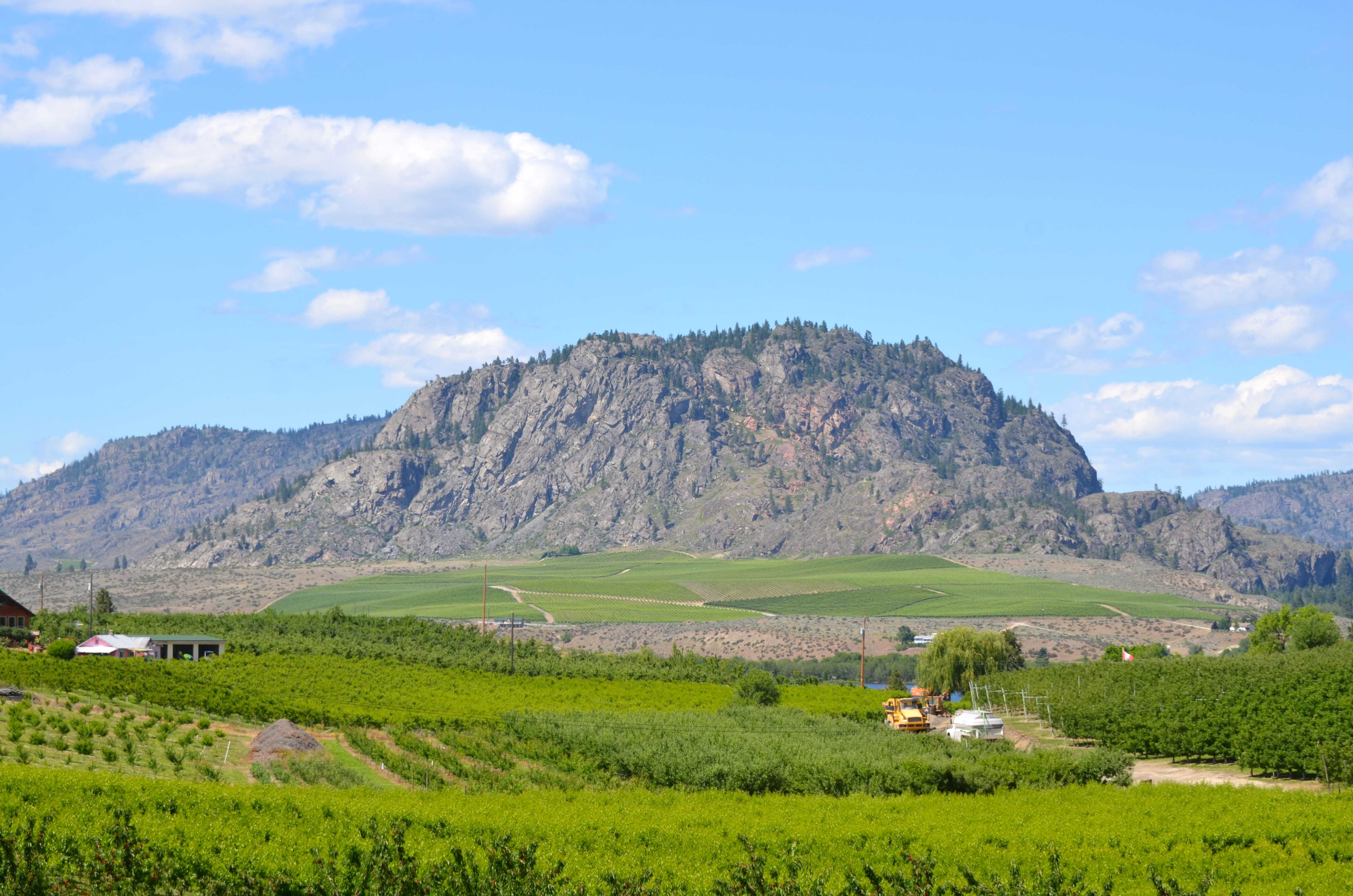 Black Sage